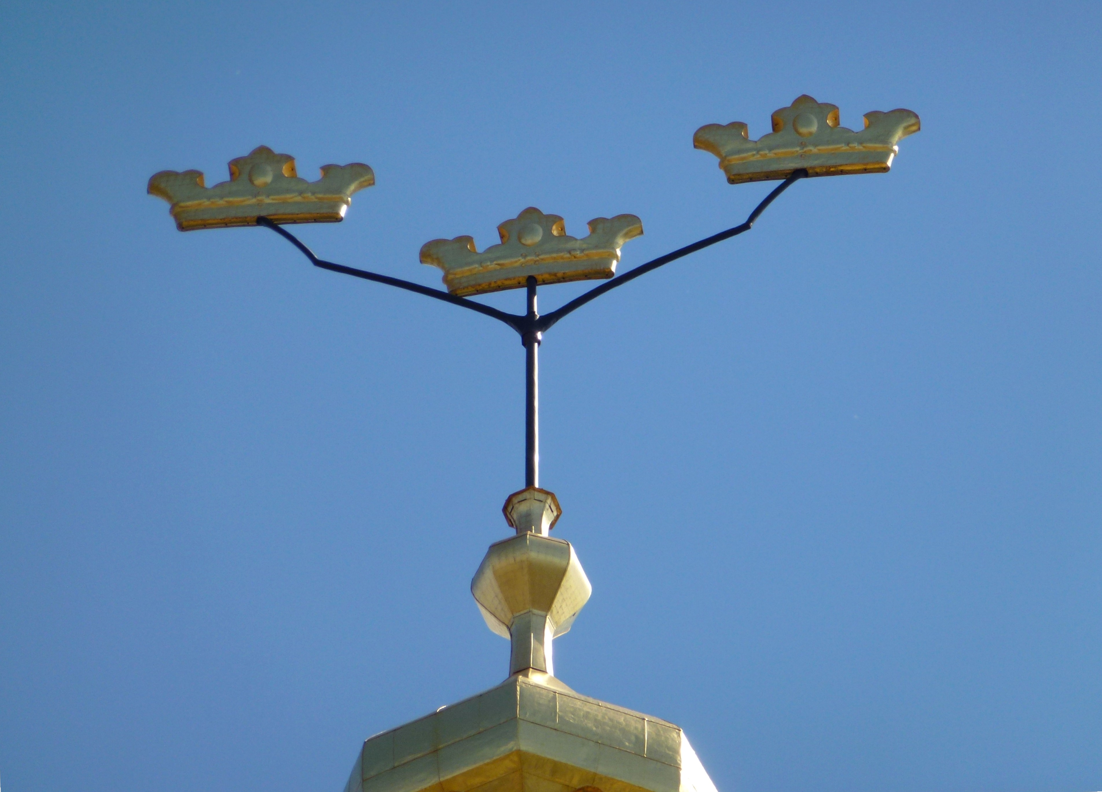 Stockholms stadshus tornspiran Tre Kronor